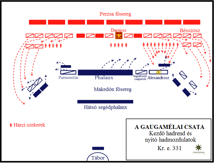 Gaugamélai csata, i.e. 331. - kezdő hadrend és nyitó hadműveletek